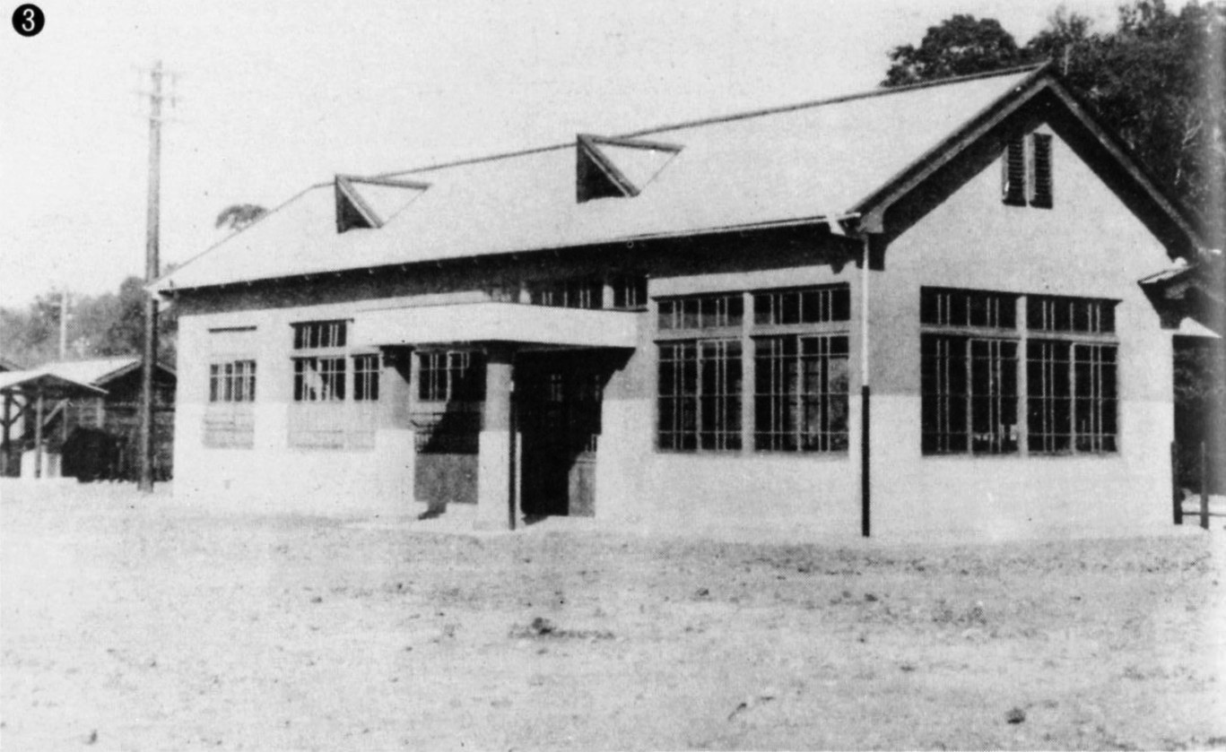 開業当時の印南駅。